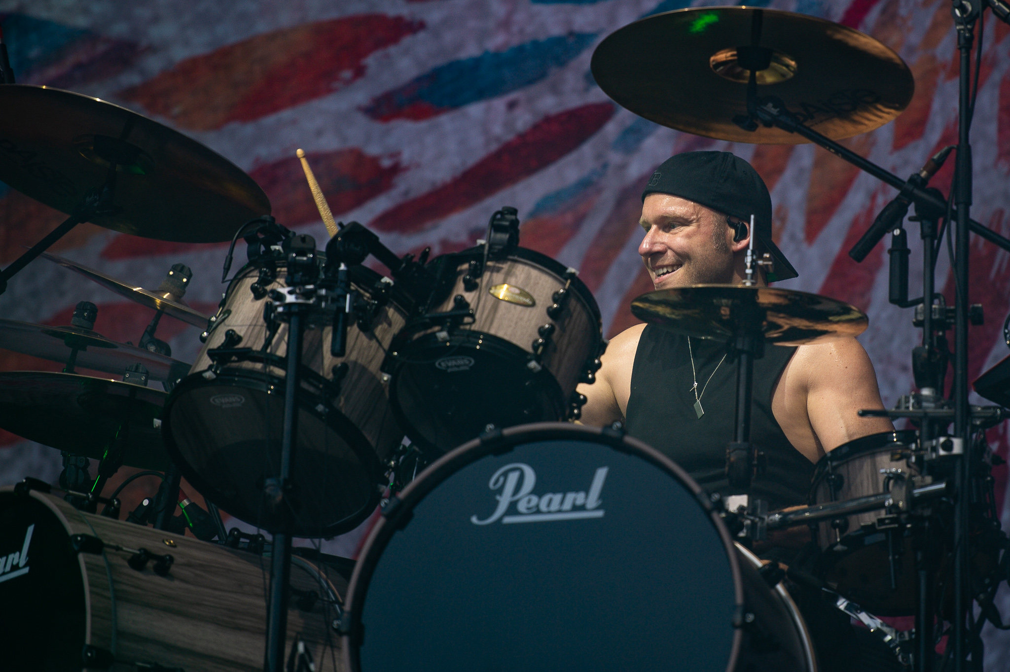 ARGO-Konzerte,Beck's Park Stage,Bullet for My Valentine,Festival,Jason Bowld,Konzert,Livekonzert,Livemusik,Musik,RiP,Rock im Park 2018